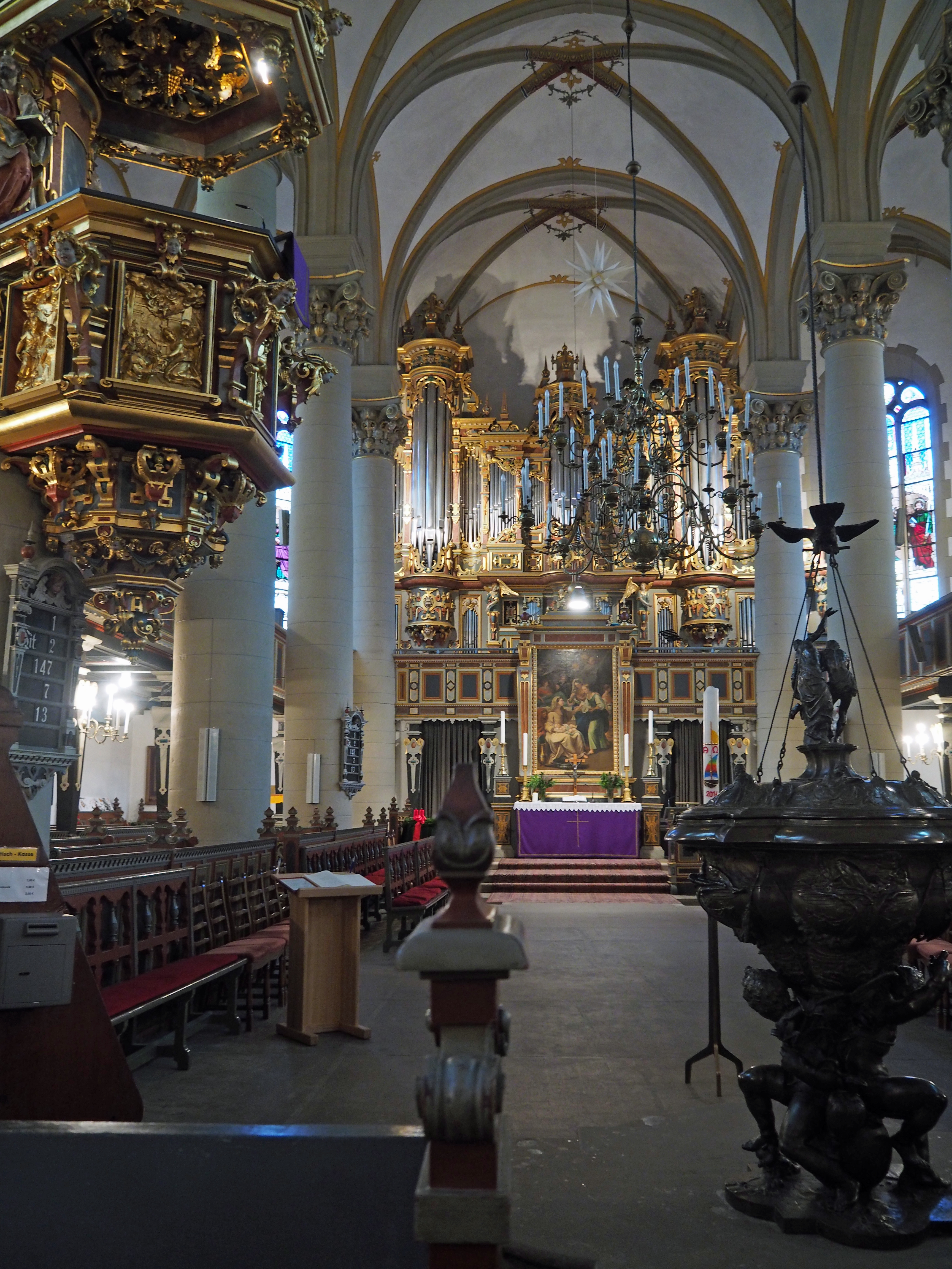 Langhaus mit Kanzel und Altar und Orgel in der Stadtkirche Bückeburg